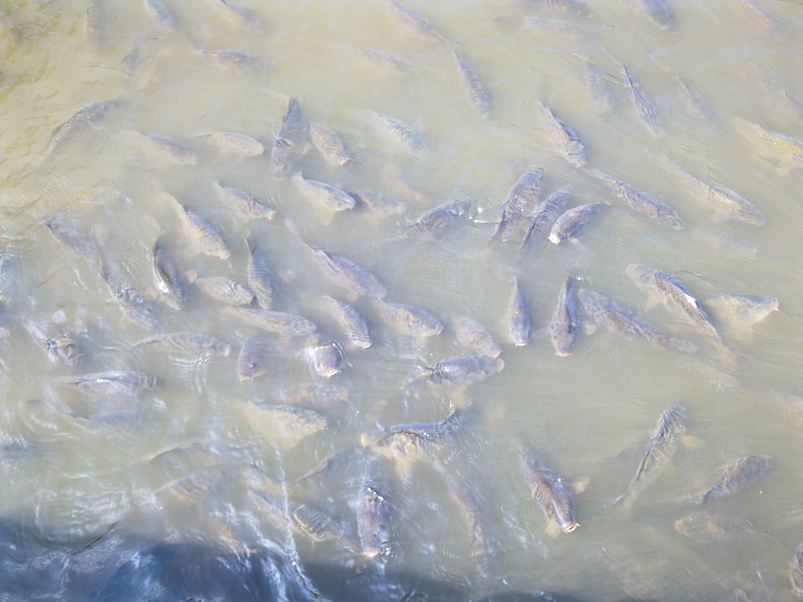 Česky: Fish